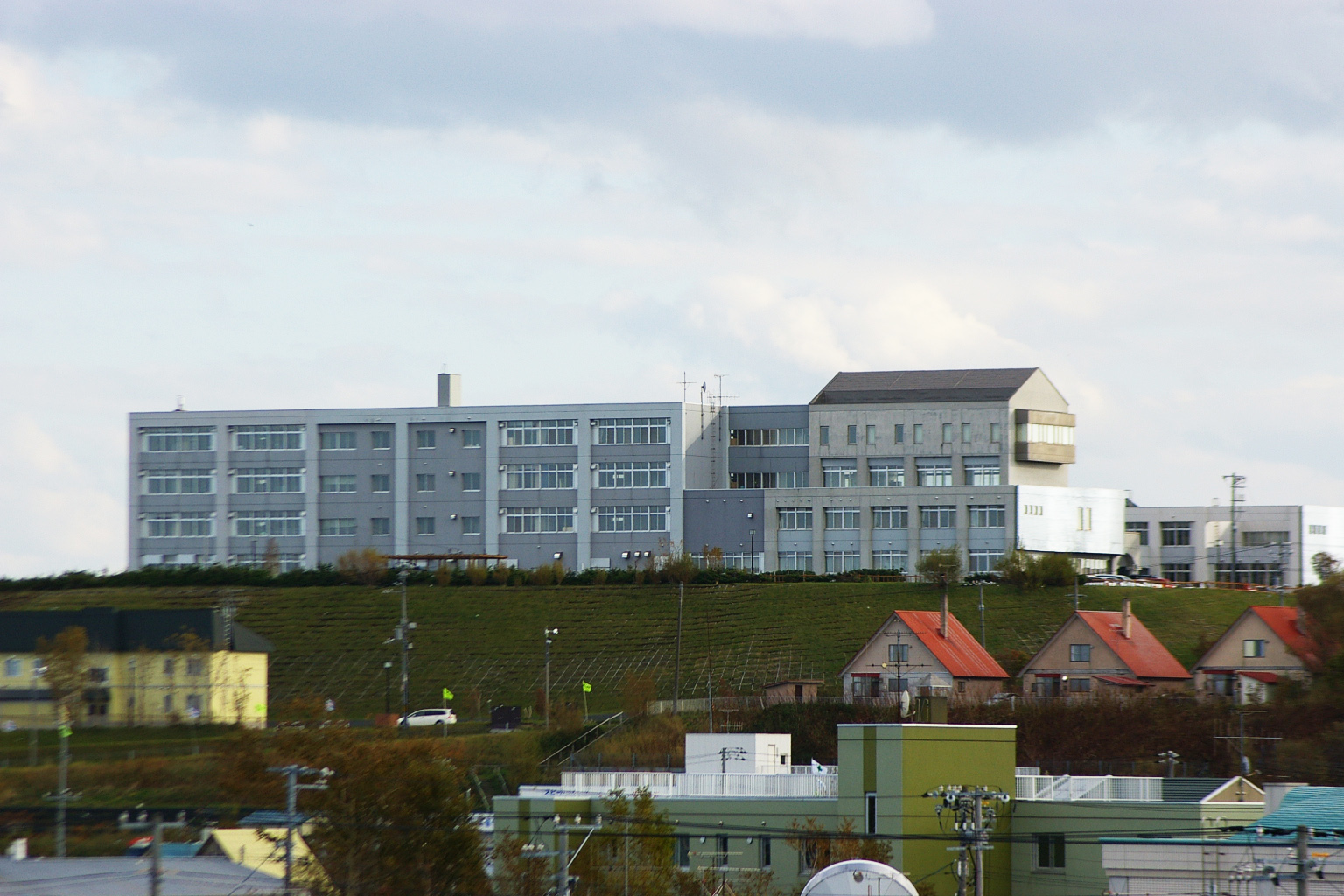 Hokkaido Wakkanai high school.